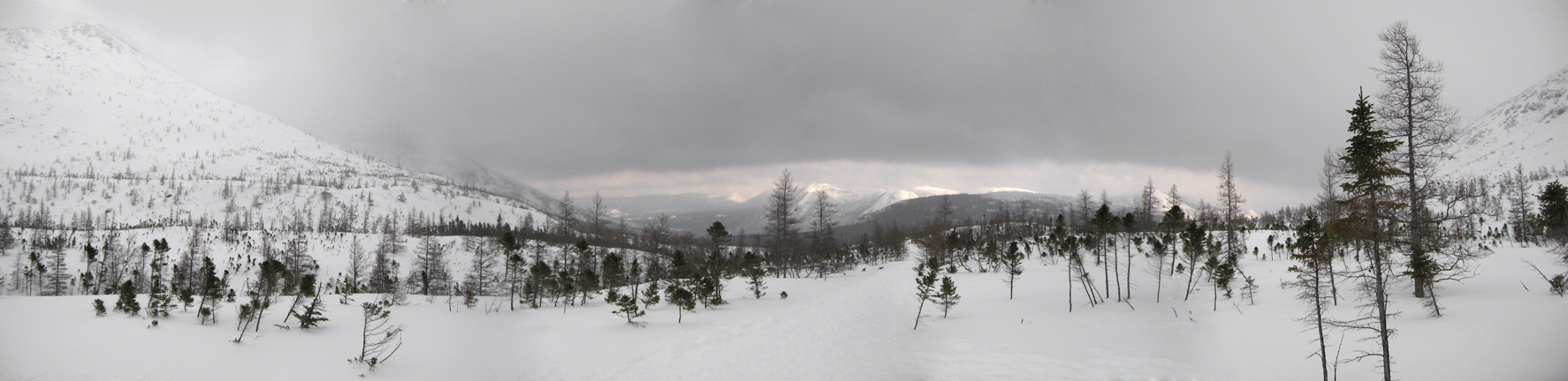 Montagnes dans le Parc National de la Gaspésie (Québec) Canada Hiver 2008-2009